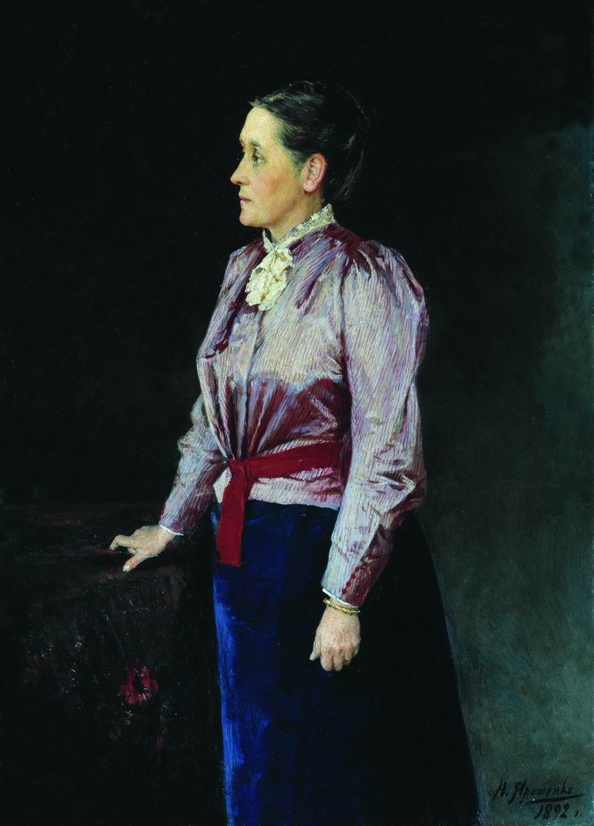 С.В. Панина